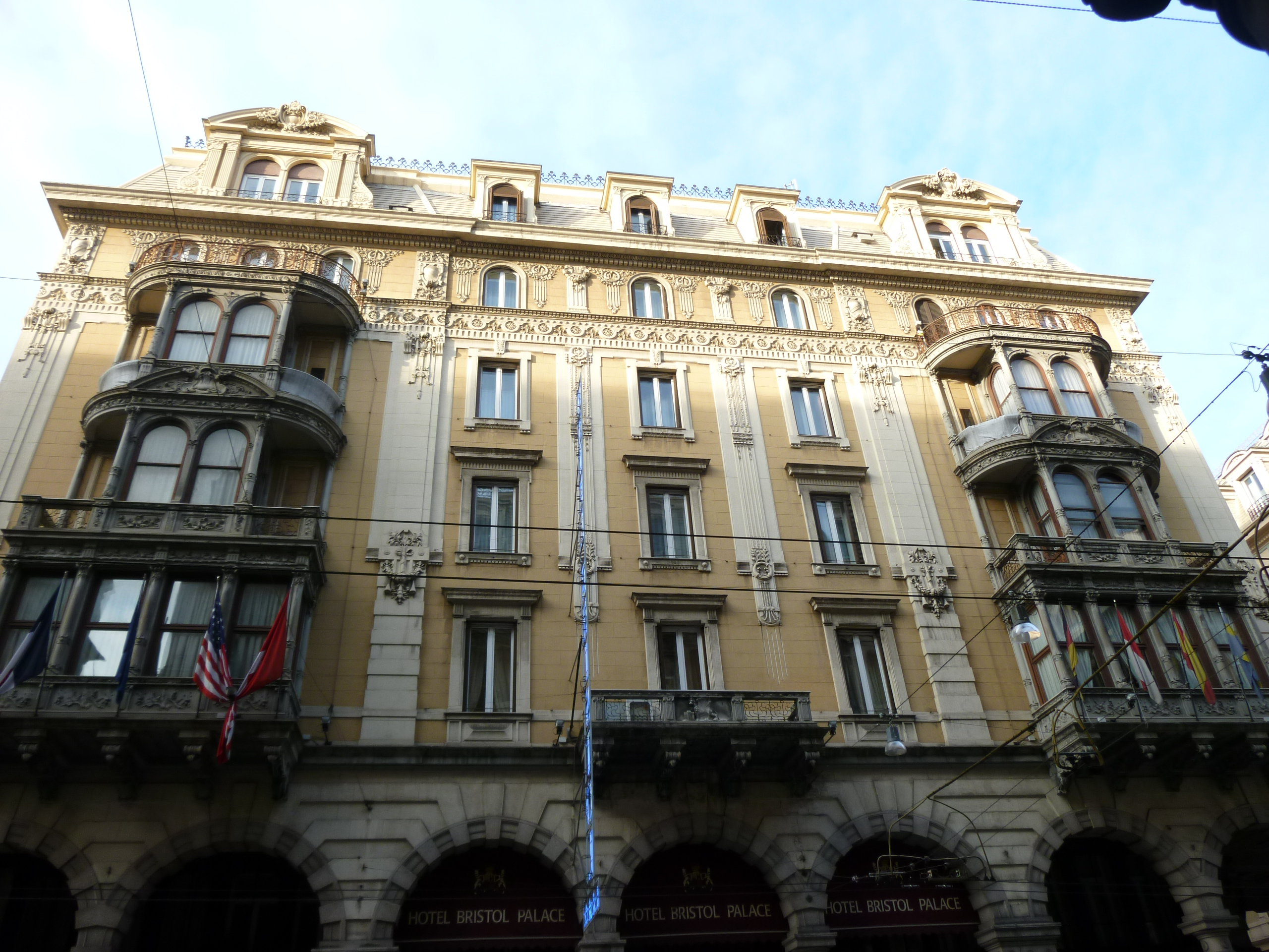 Genova